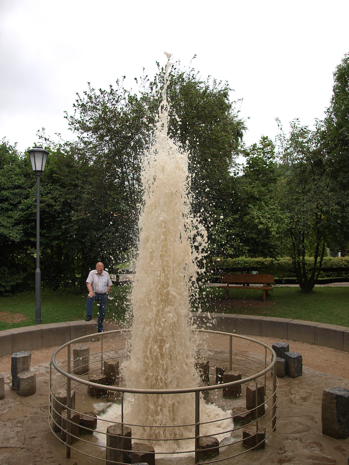 Kaltwassergeysir "Wallender Born" in Wallenborn (Eifel)